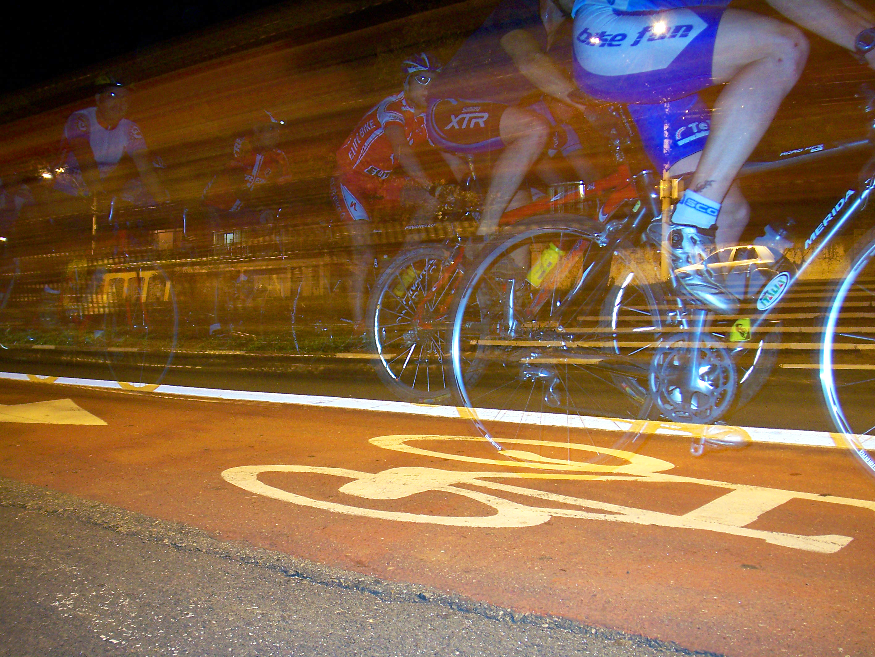 Alguns ciclistas percorrendo a ciclovia da Lagoa do Taquaral em alta velocidade / Bikers at full speed on the bike lane.